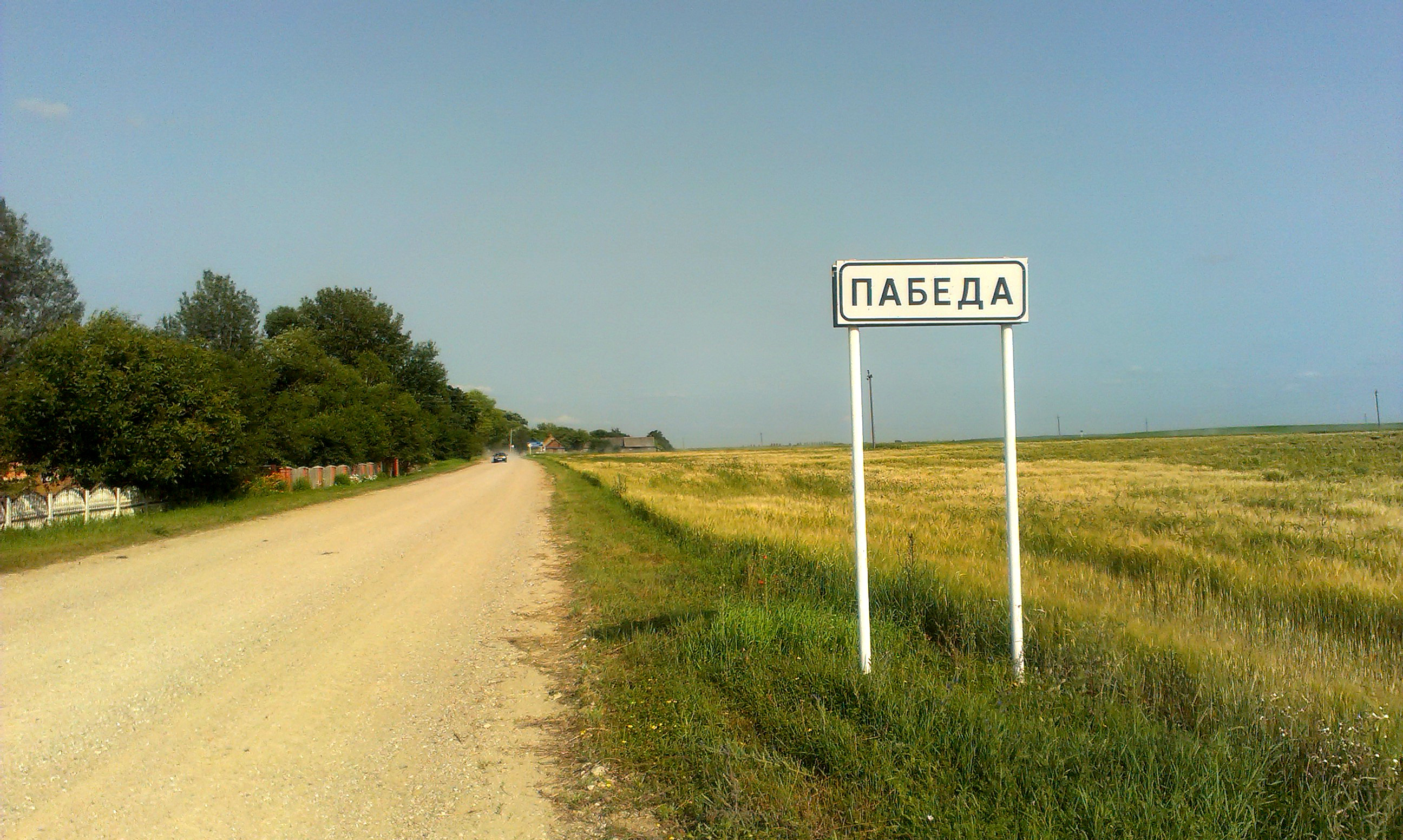 Перамога